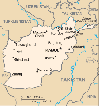 Karte Afghanistan, von mir übersetzt CIA World Factbook